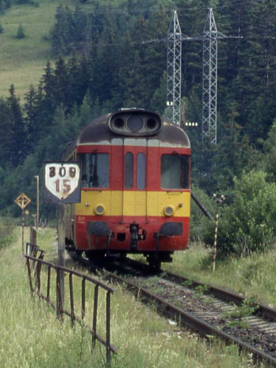 Neigungszeiger auf der Bahnstrecke Margecany–Červená Skala in der Slowakei (Bildausschnitt des Orginalbilds)